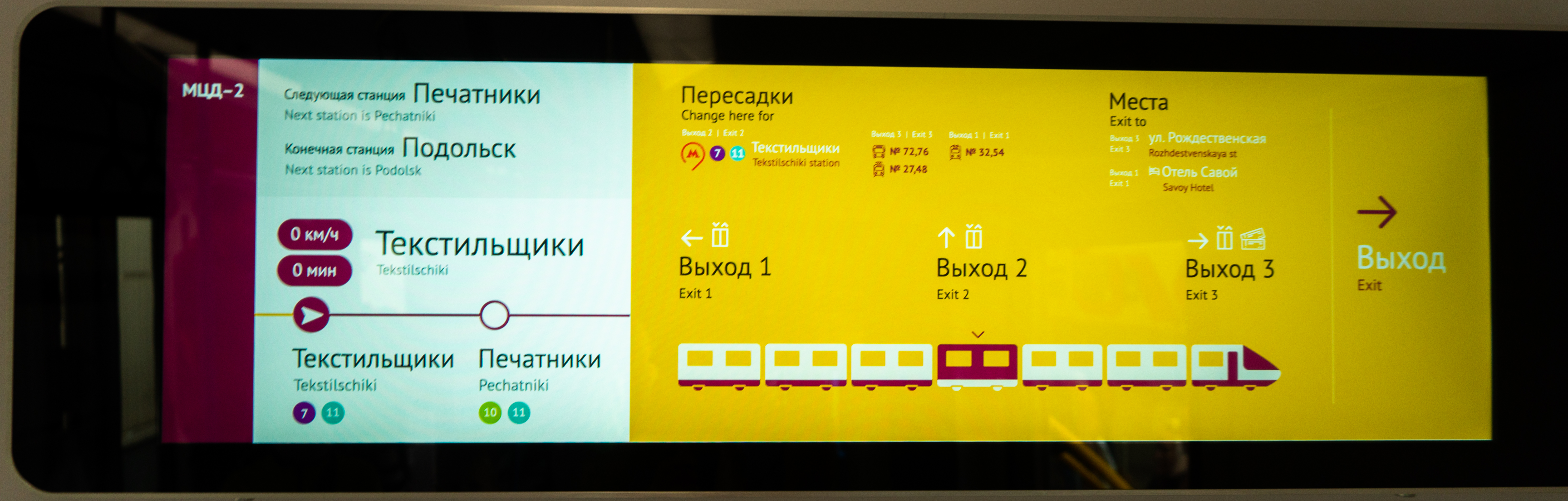 Маршрутный дисплей в салоне электропоезда ЭГ2Тв-027 «Иволга»